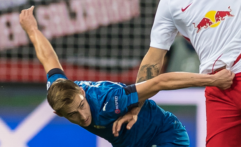 UEFA Champions League - Play-Offs - FC Salzburg vs Dinamo Zagreb. Bild zeigt Marko Rog (Dinamo Zagreb) und Duje Caleta-Car (RBS).